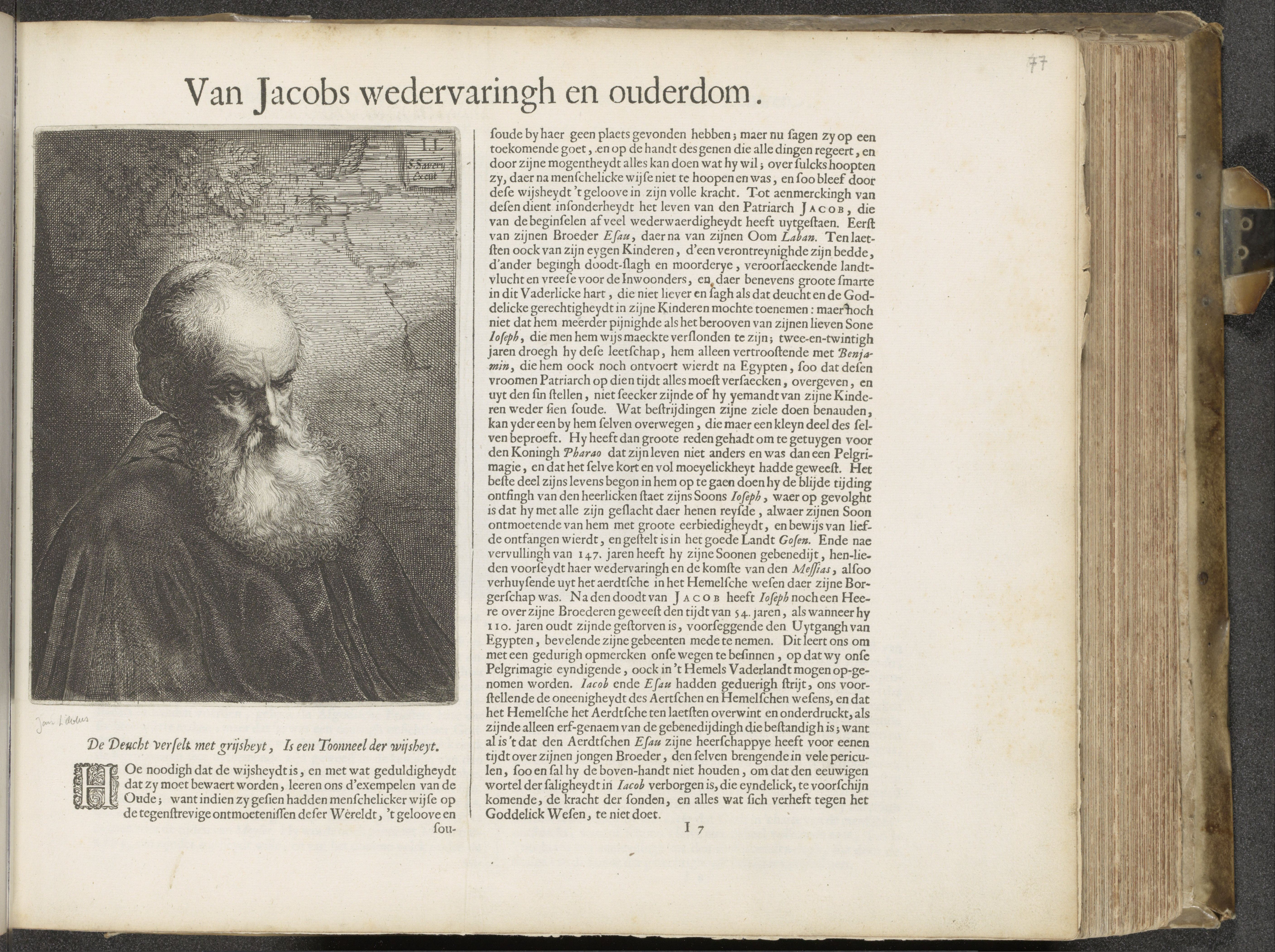 IdentificatieTitel(s): Portret van aartsvader JakobVan Jacobs wedervaringh en ouderdom (titel op object)Den Grooten Emblemata Sacra, bestaande in meer dan vier hondert bybelsche figuren, zoo des Ouden als des Nieuwen Testaments (serietitel)Objecttype: prent tekstblad albumblad Objectnummer: RP-P-2015-10-77Catalogusreferentie: Hollstein Dutch 140Opmerking: SaveryHollstein Dutch 78Opmerking: LievensOmschrijving: Portret van een oude man met baard voor een muur, in dit album gebruikt als portret van aartsvader Jakob. De begeleidende tekst begint met een kleine gedecoreerde initiaal H. Daarbij een motto in het